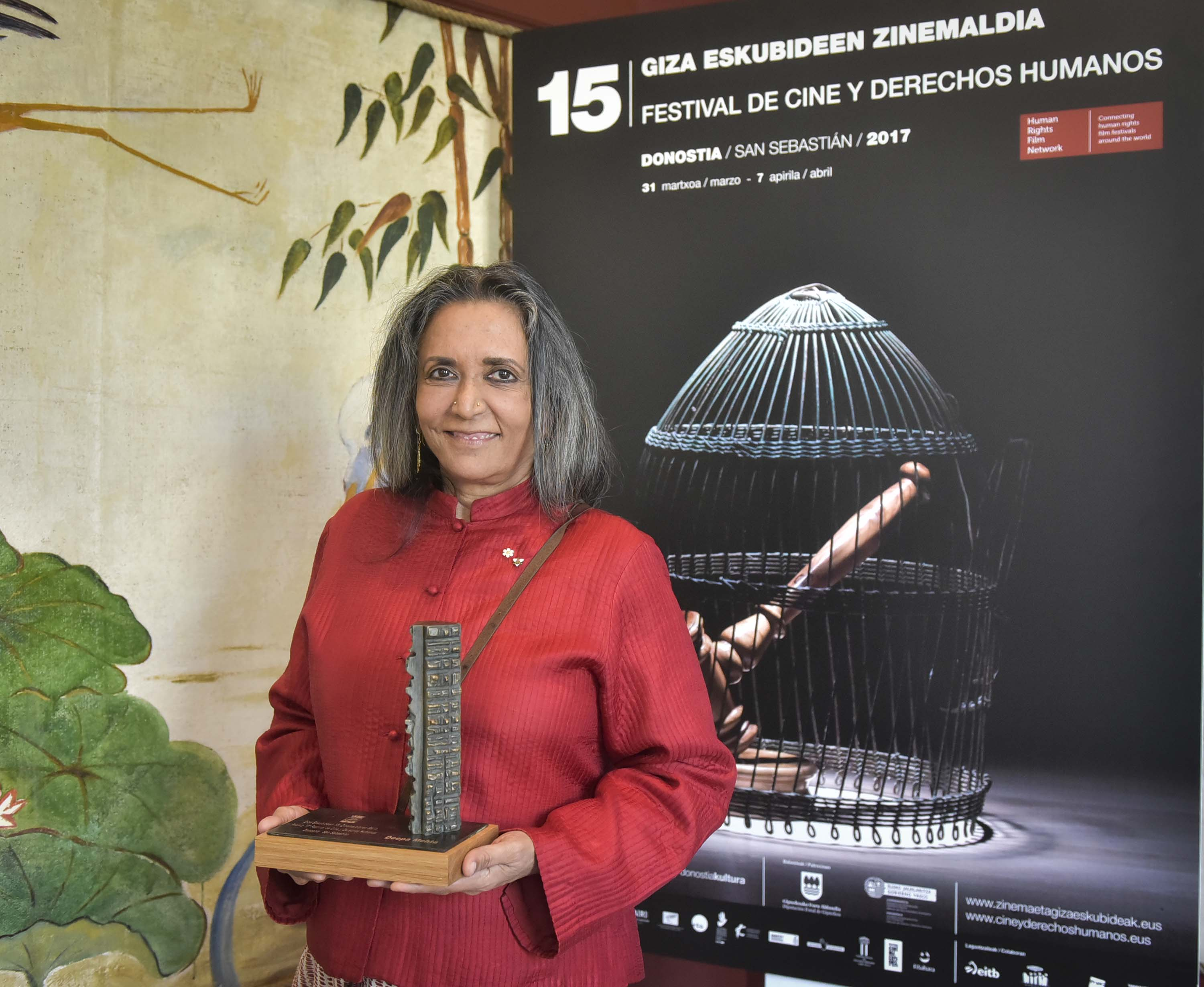 Victoria Eugenia Antzokia / Teatro Victoria Eugenia Argazkia / Fotografía: Iñigo Royo